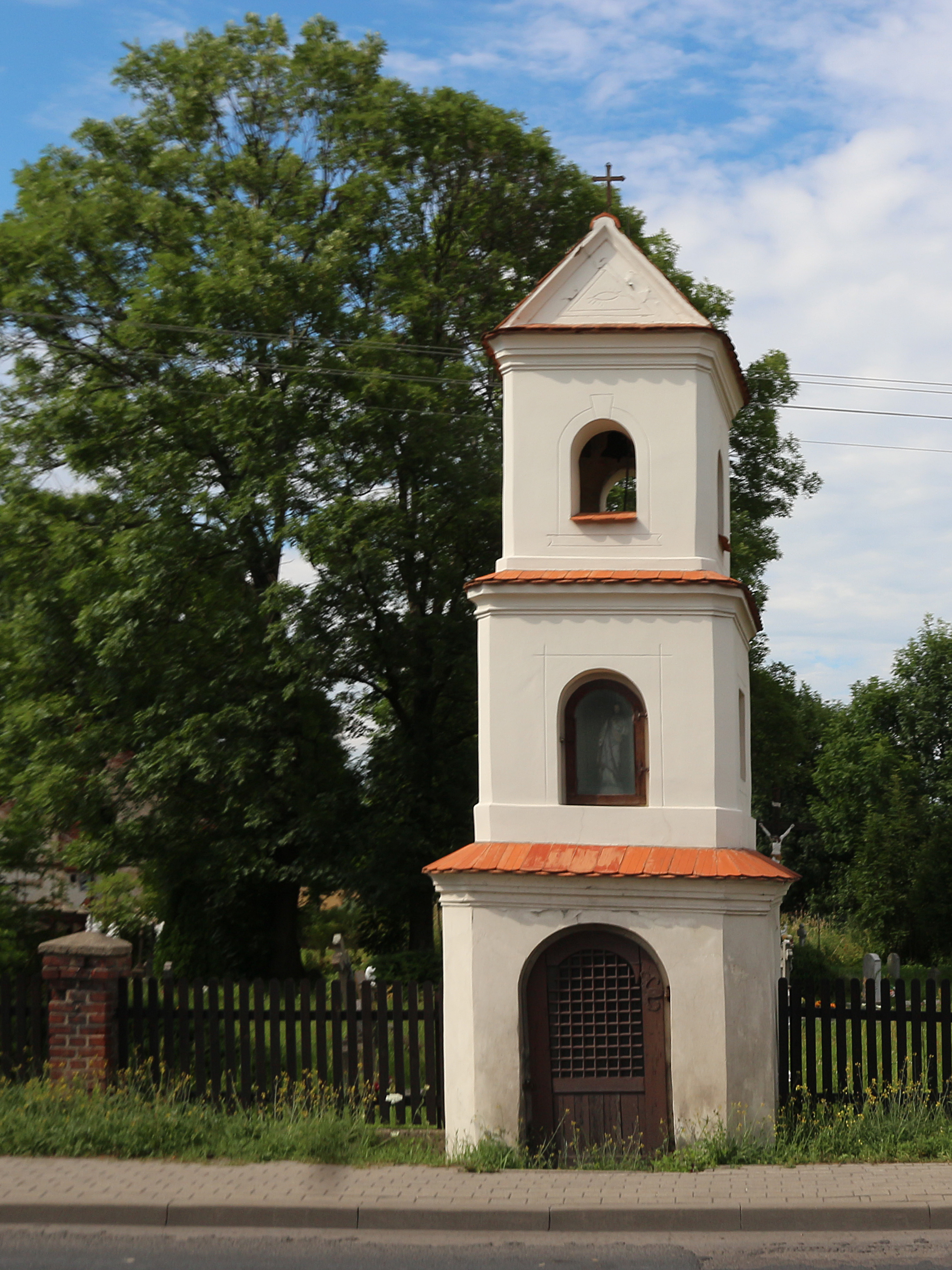 Zabytkowa kaplica i cmentarz (w tle) w Opolu Bierkowicach.